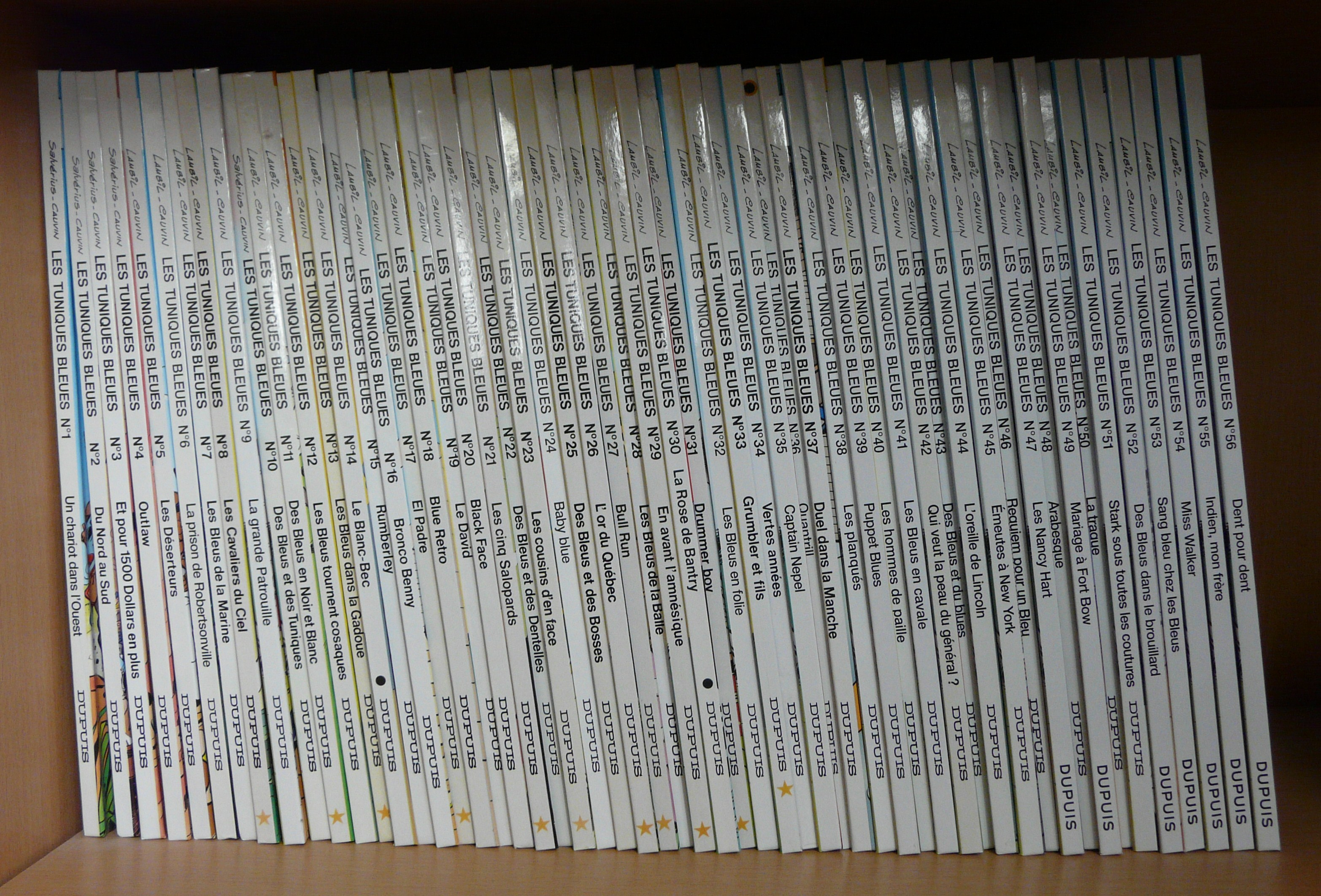 Collection de bande dessinée Les Tuniques bleues, numéros 1 à 56.